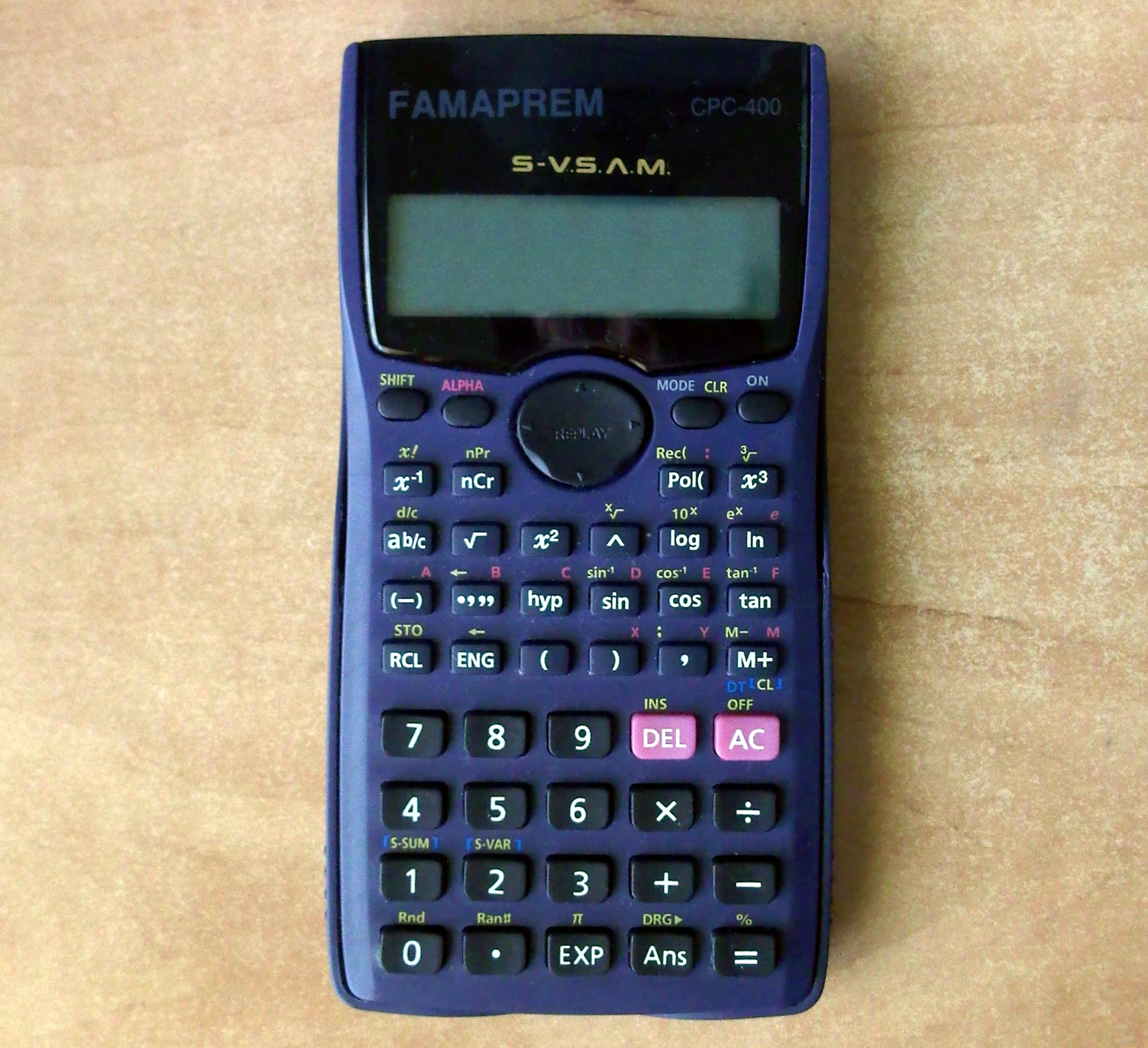 Calculadora científica FAMAPREM CPC-400 Importado por Casa Prem S.L. Polígono Industrial Vallecas C/ Gamonal Nº 45 28031 MADRID, España Fabricado por SUNWAY ELECTRONICS INDUSTRIAL CO. LTD.